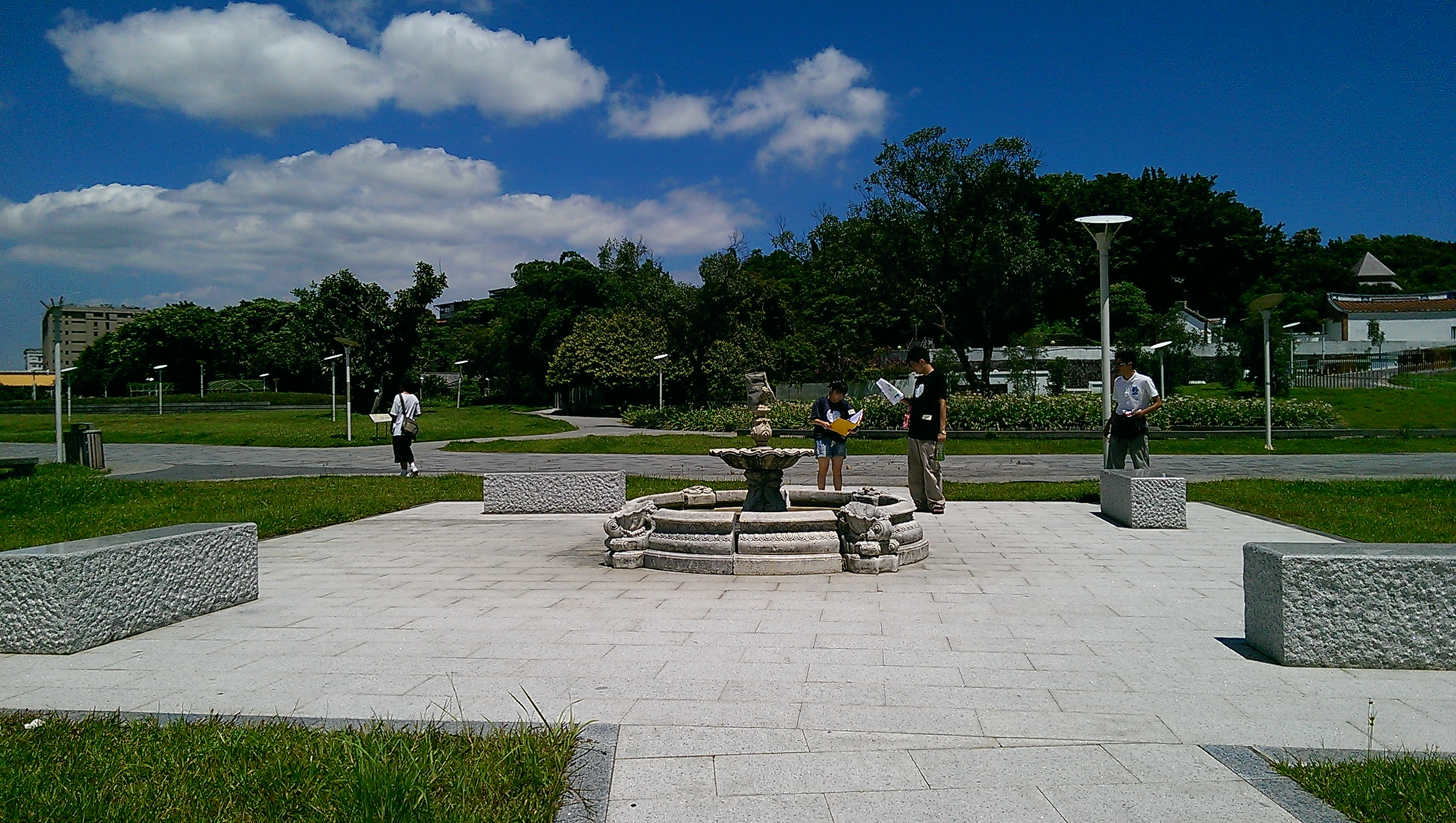 Yuanshan Park